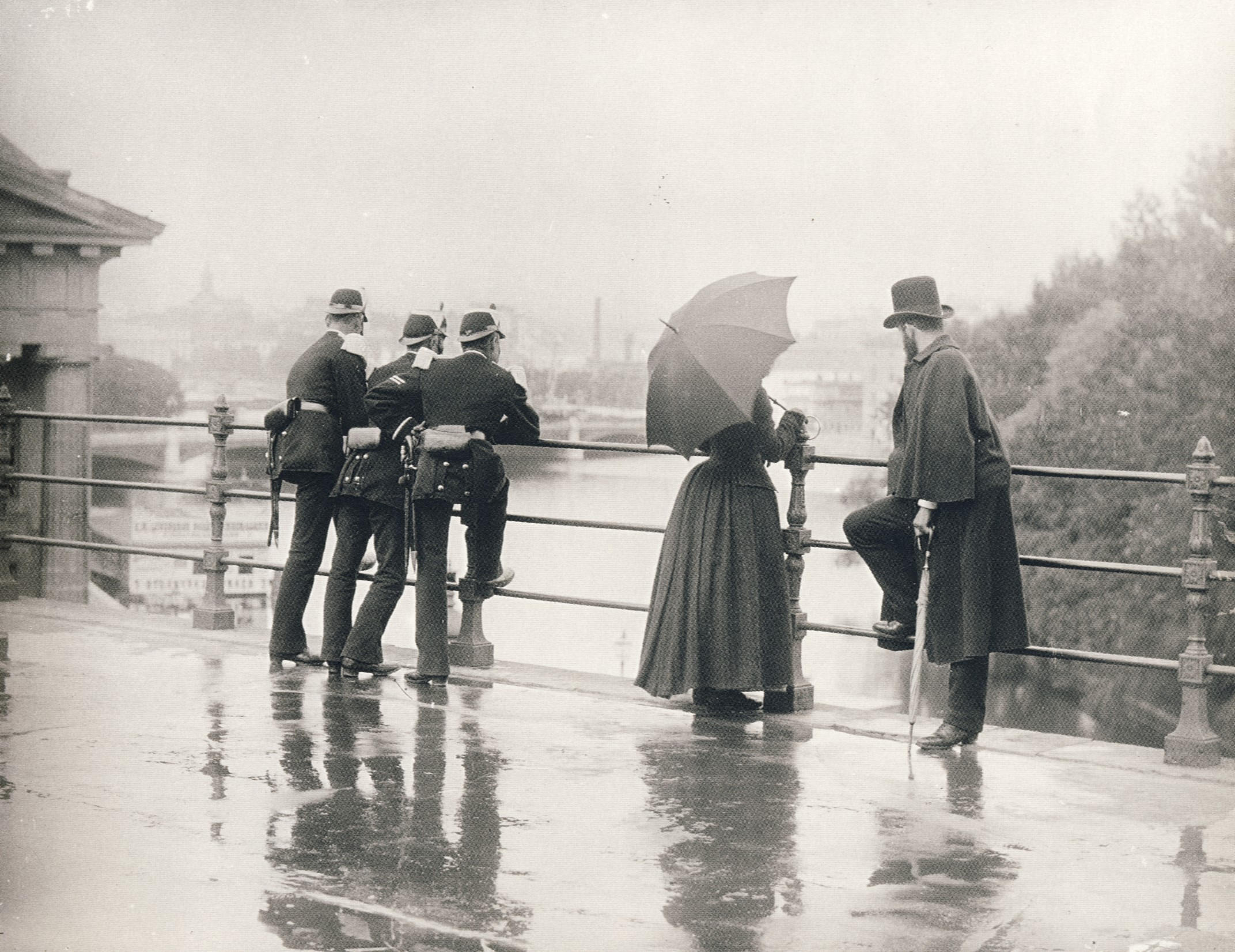 Högvaktsterrassen Gamla stan, Stockholm